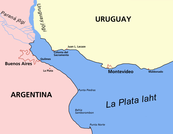 La Plata laht